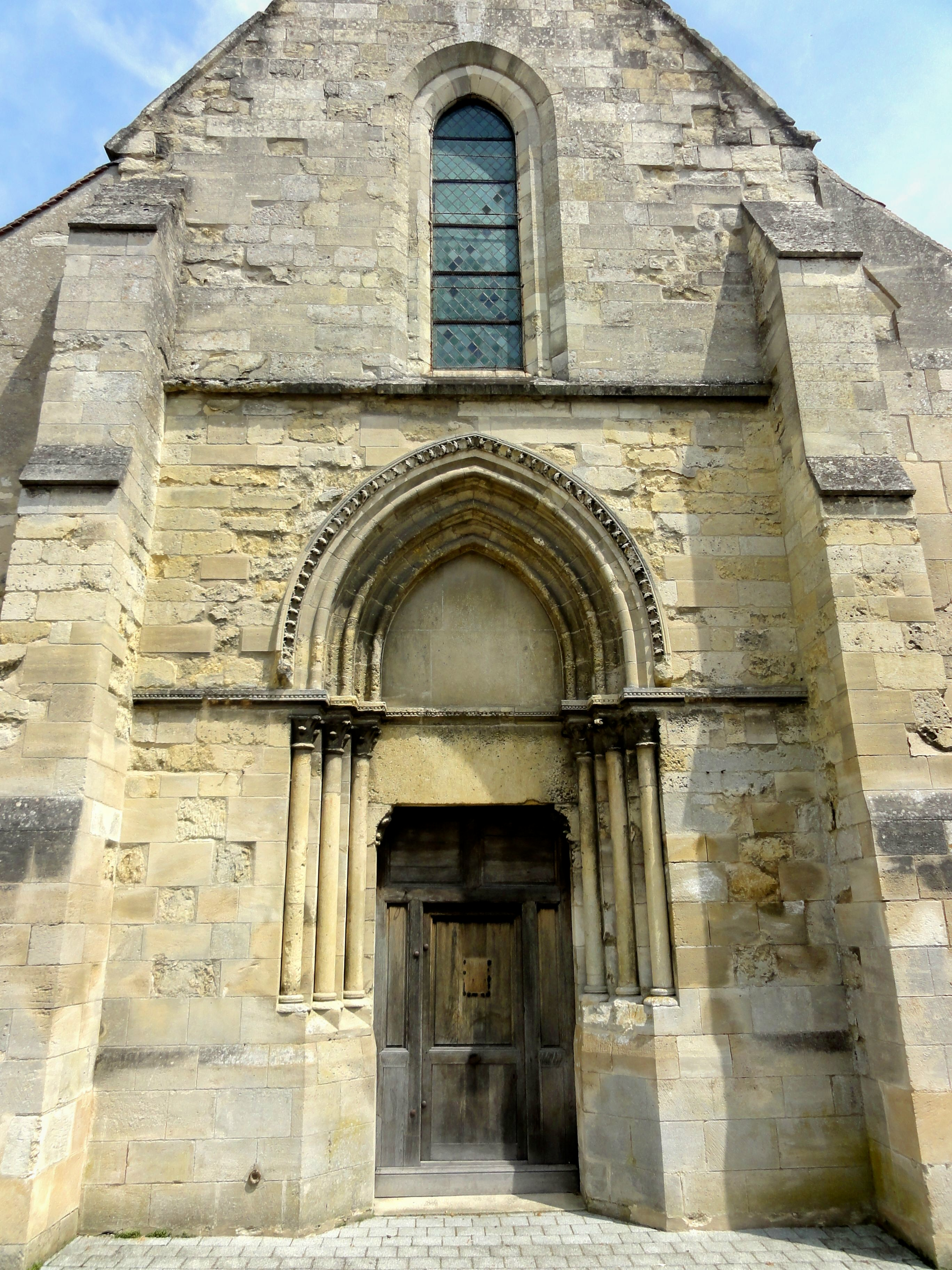 Façade occidentale.